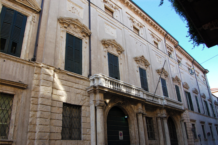 Fotografia del palazzo Forti a Verona